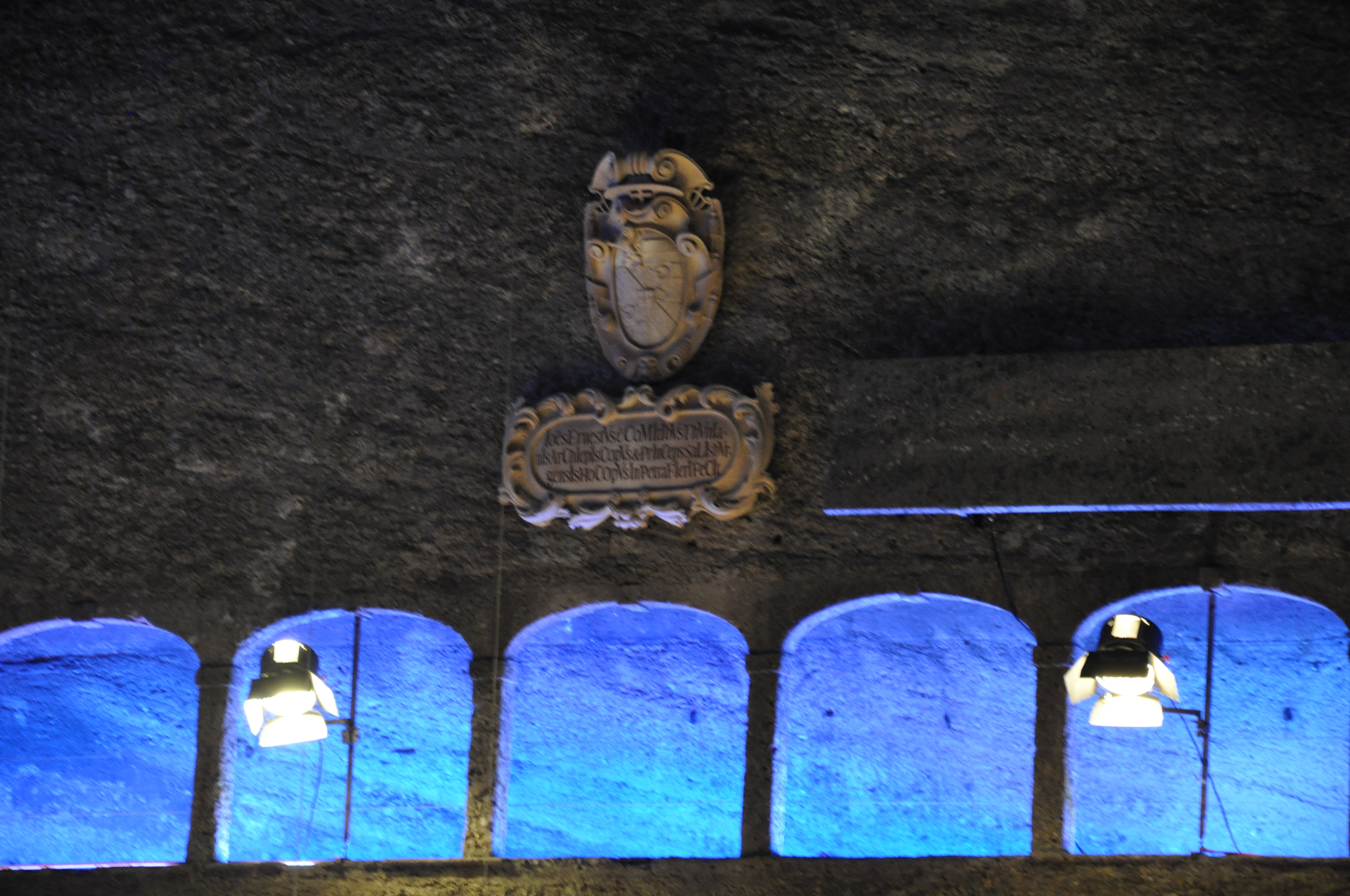 Salzburg, Felsenreitschule – Inschrift mit Wappen Johann Ernst von Thun